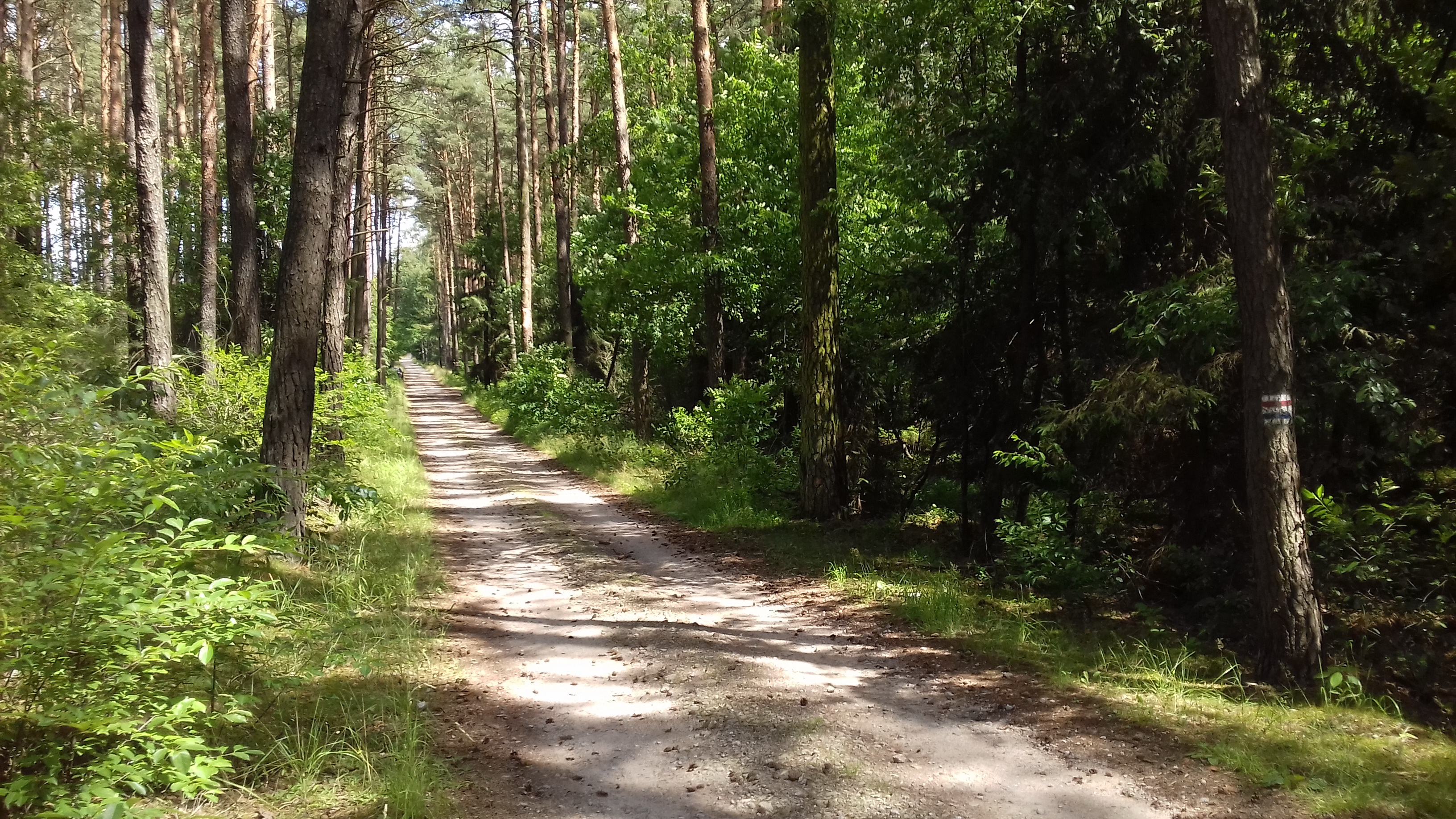 Wspólny odcinek szlaków pieszych nr 3578 (czerwonego) i nr 3583 (niebieskiego) w lesie Bogulin